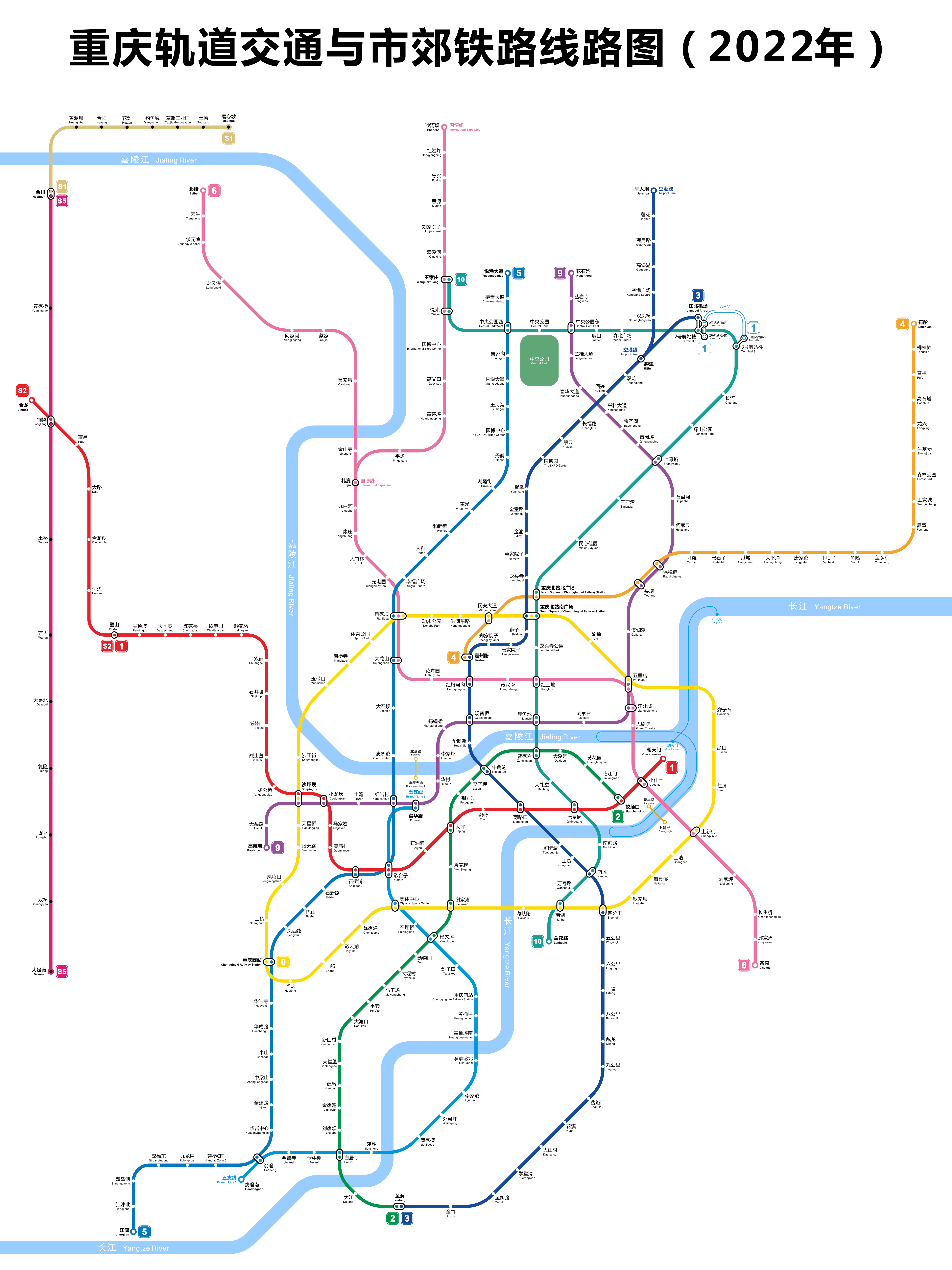 重庆轨道交通第二轮建设规划图